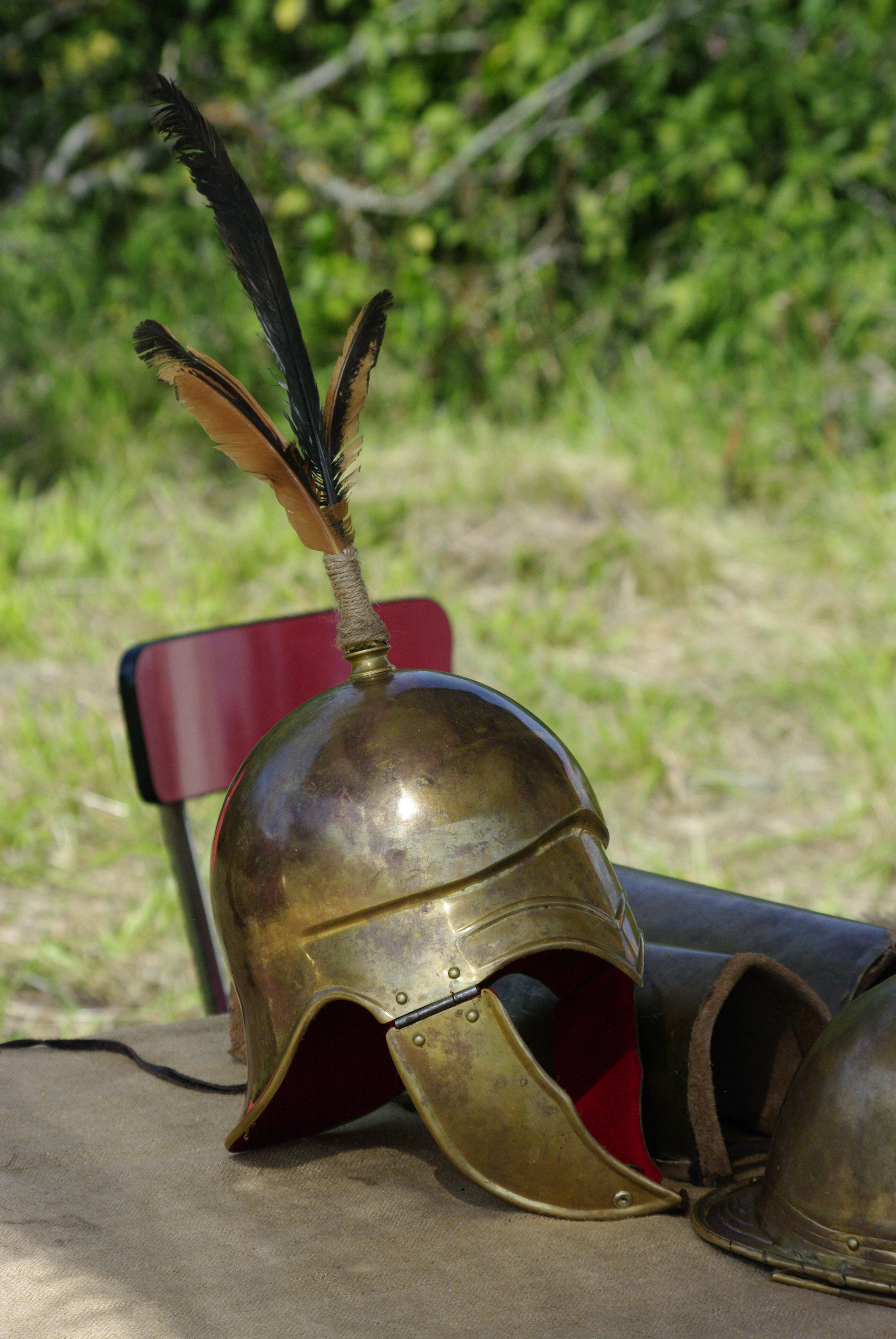 Casque de hastati (ou hastaire) de la légion républicaine du IIIème siècle avant J.-C. Il peut avoir également équipé certains princeps. Photographie réalisée le 22 juillet 2012 sur le plateau de Gergovie lors des Arverniales.